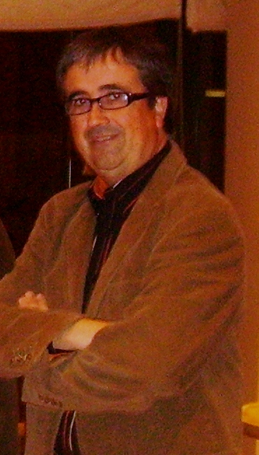 El Político de ERC Joan Puig i Cordon